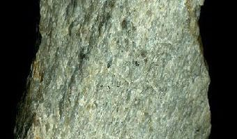 Porfýroid - Ľubietová, Veporské vrchy, Slovakia. Seems to be a porphyritic shist from volcanic rhyolite, rhyodacite